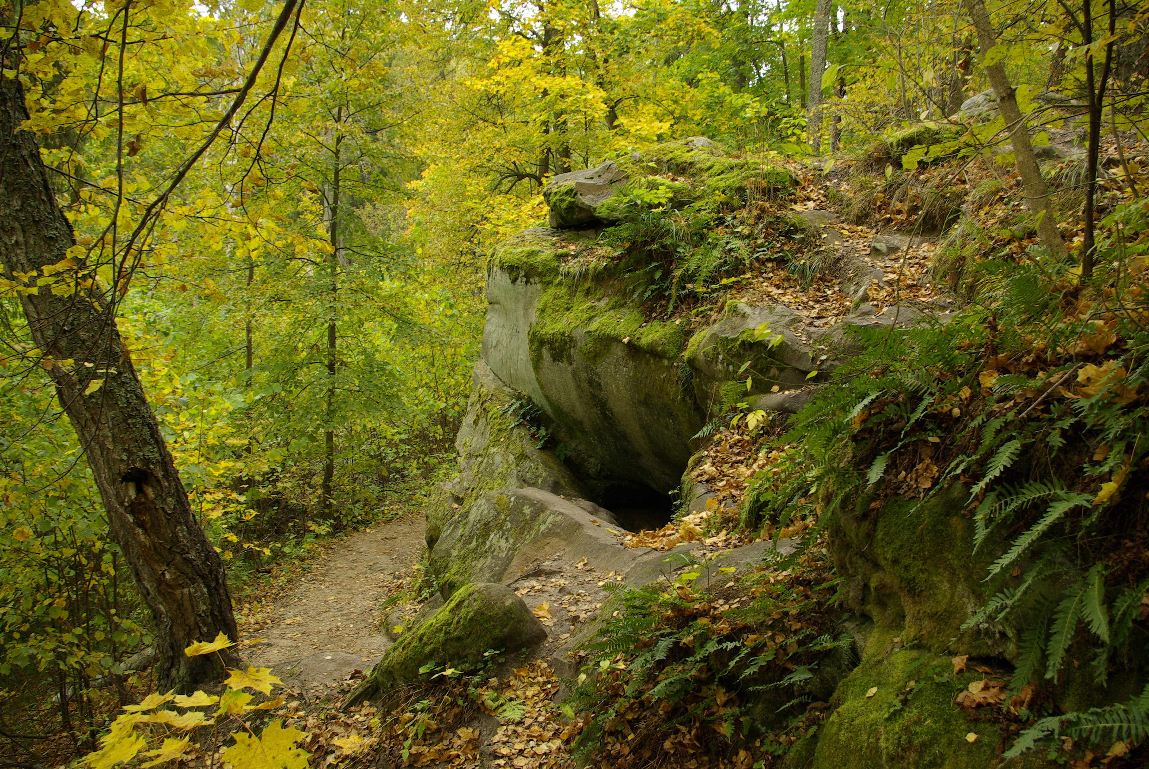 Чертово городище (Козельск)